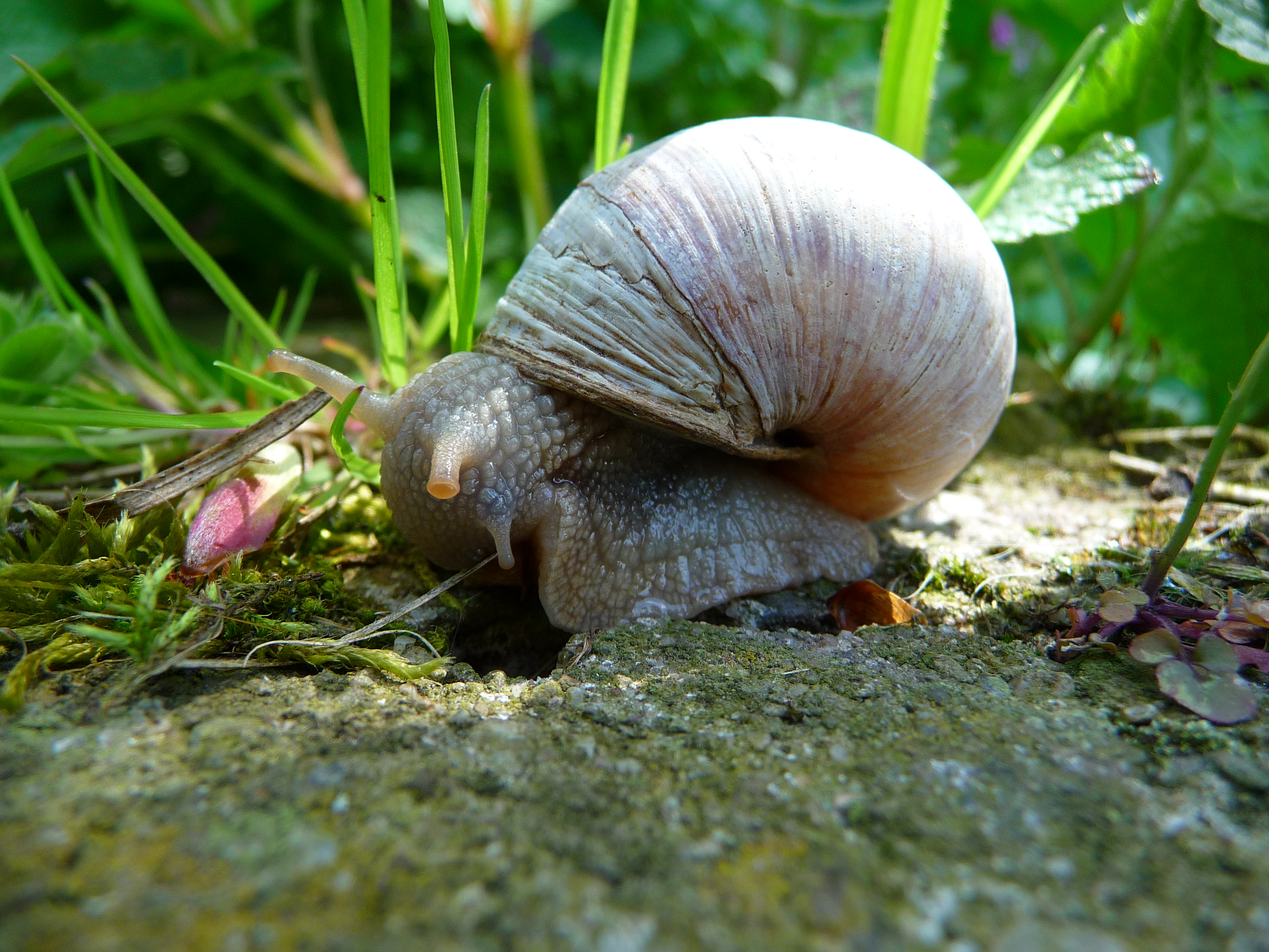 Weinbergschnecke (Helix pomatia), fotografiert in Heidelberg (Baden-Württemberg, Deutschland)